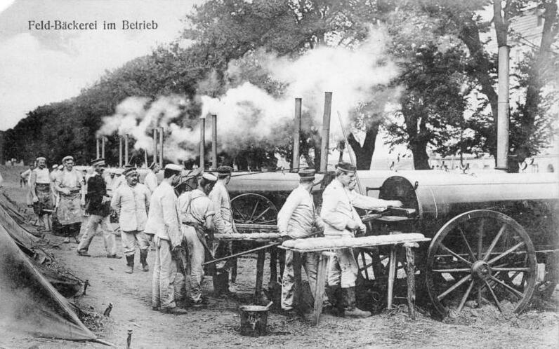 Serie: Das Deutsche Heer Feldbäckerei im Betrieb